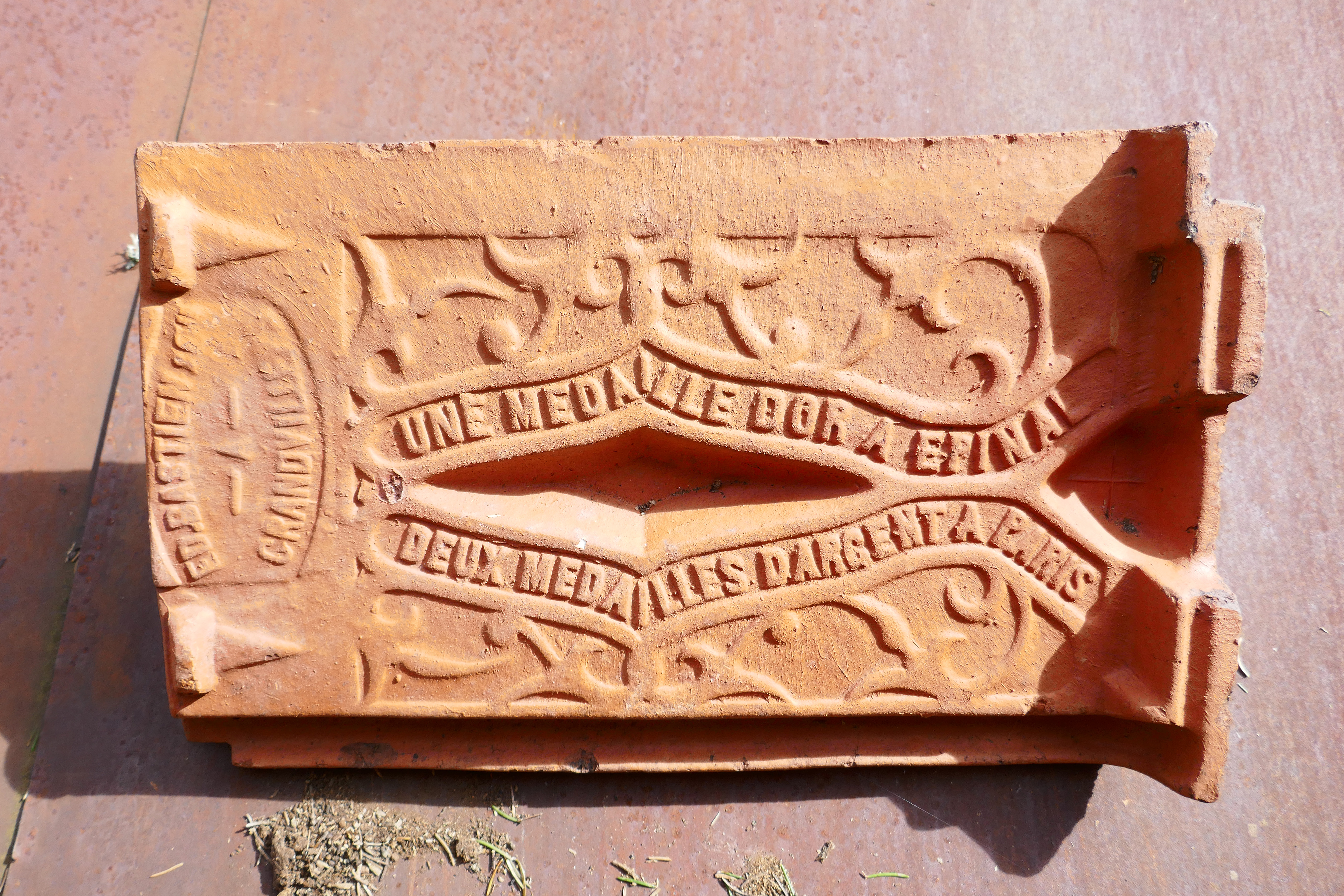 Tuile des établissements Bastien (Grandvillers, Vosges). "Une médaille d'or à Epinal. Deux médailles d'argent à Paris".